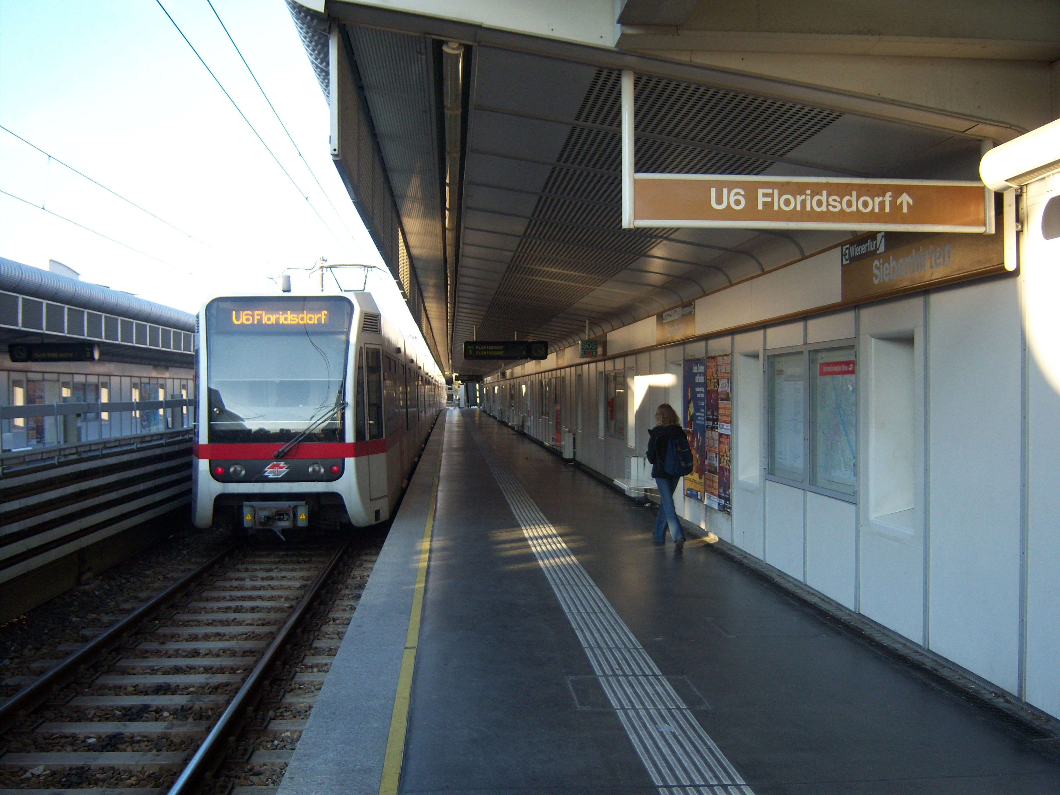 U-Bahn-Station Siebenhirten